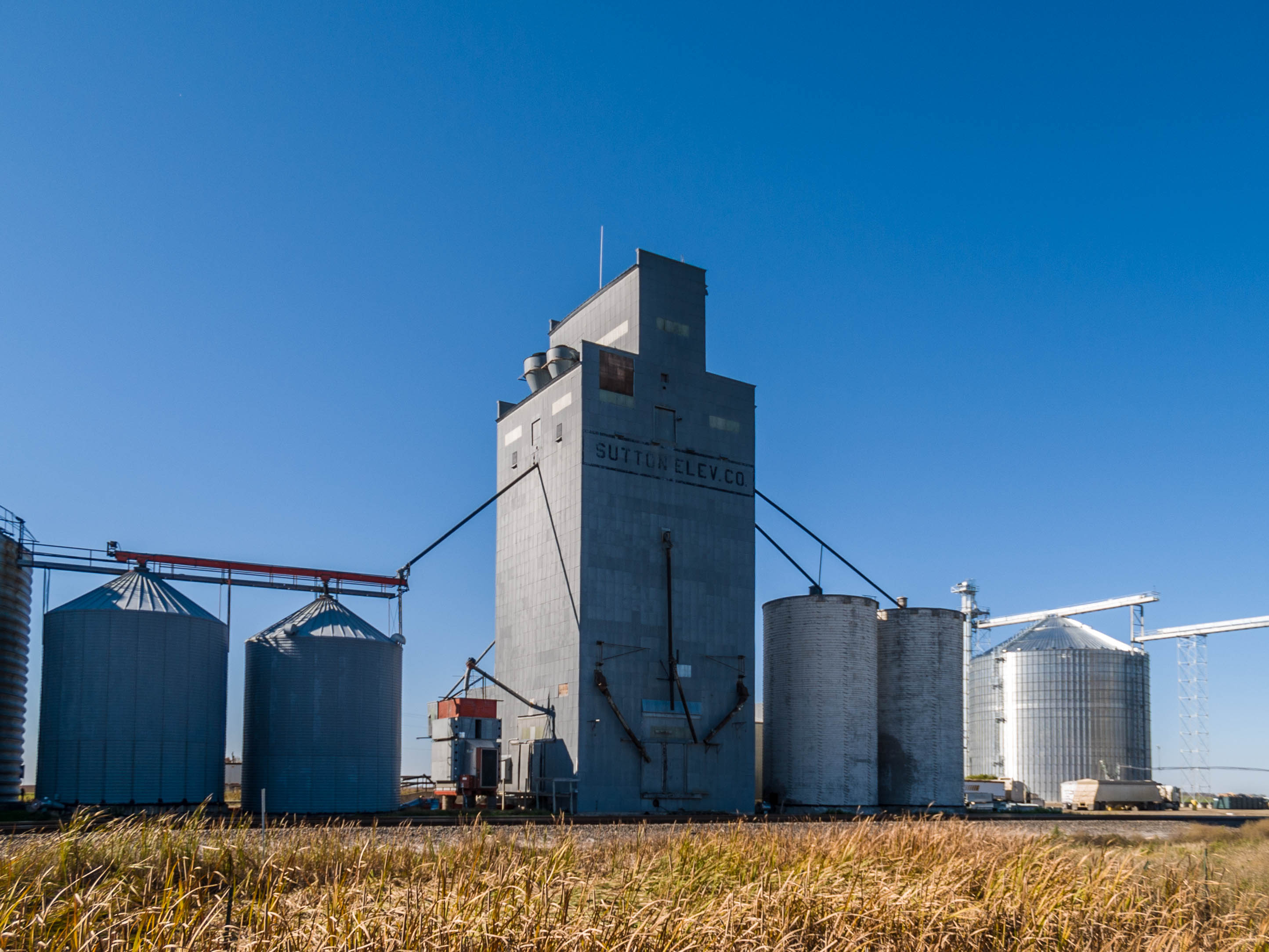 Sutton, North Dakota. From